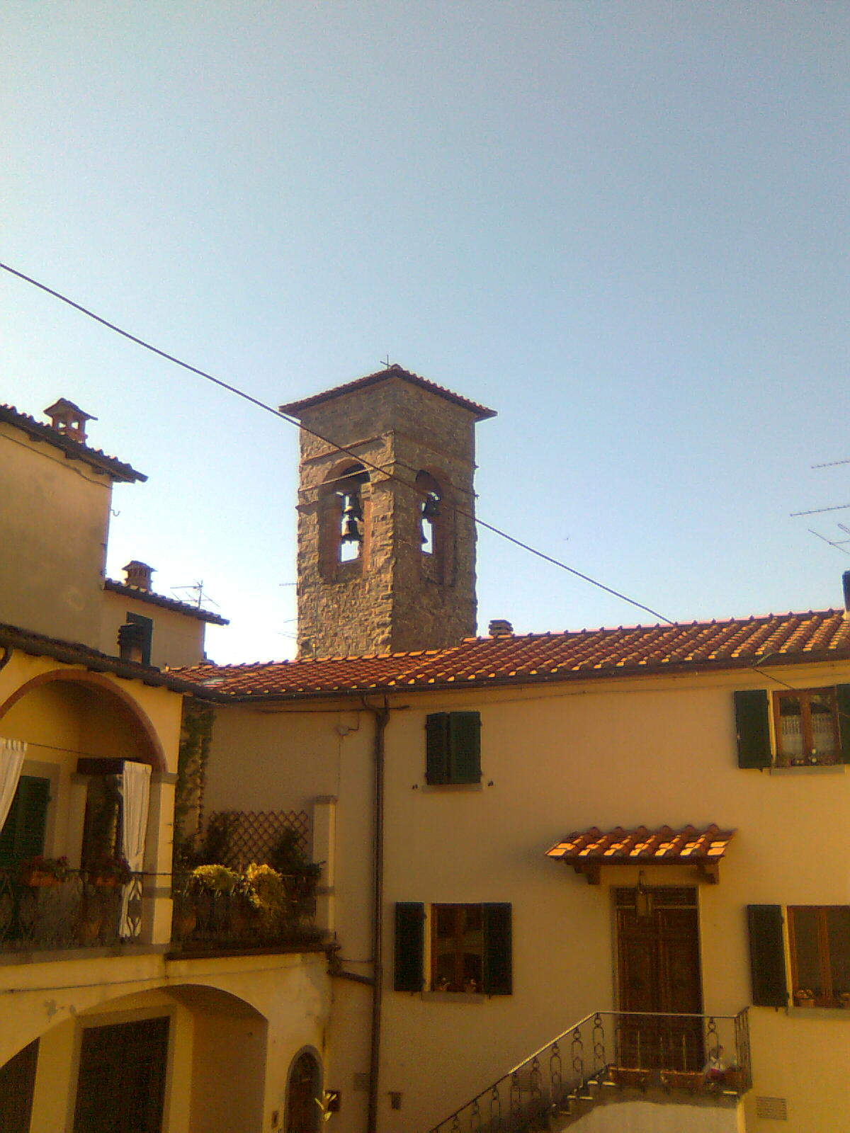 Foto del campanile di Stia